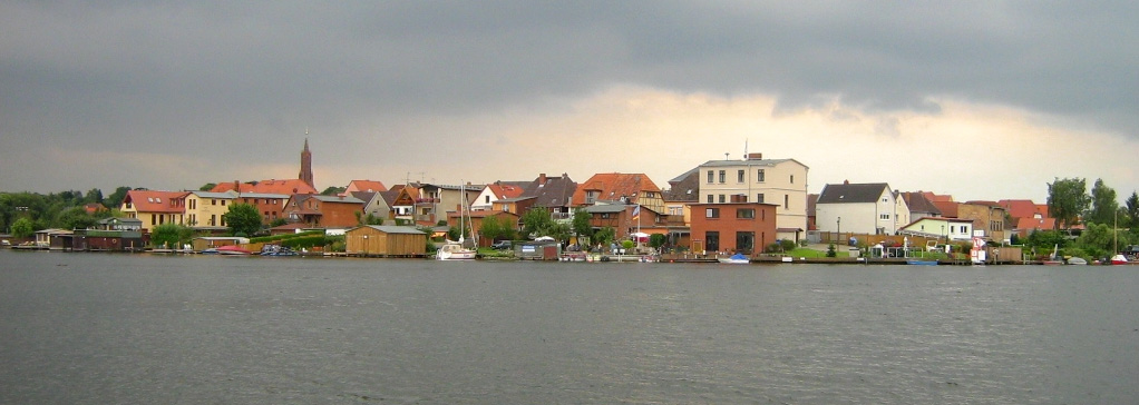 Blick über den Malchower See auf die Altstadt von Malchow (Landkreis Müritz, Mecklenburg-Vorpommern)